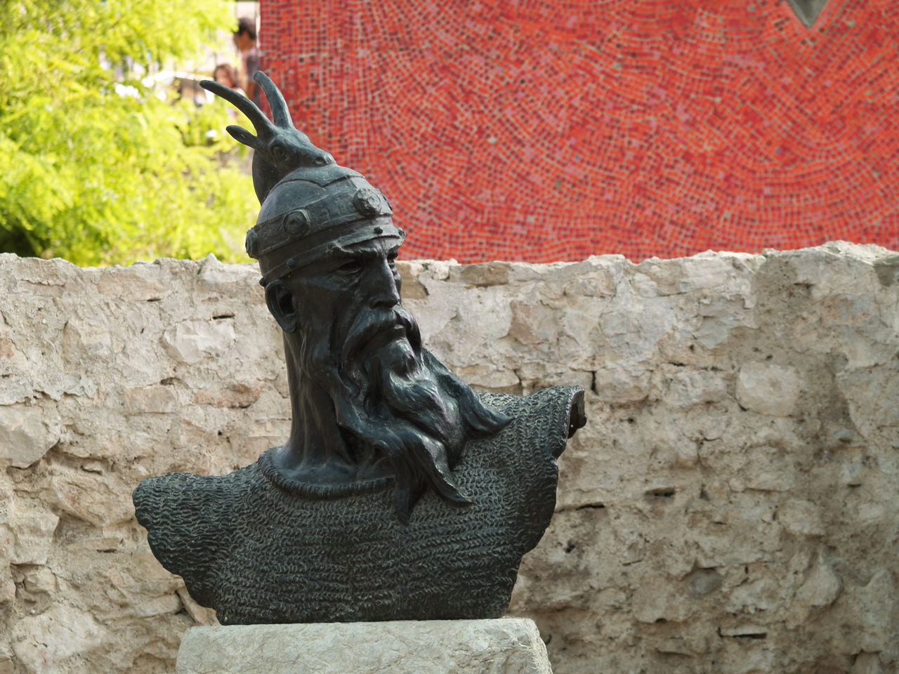 Skanderbeg